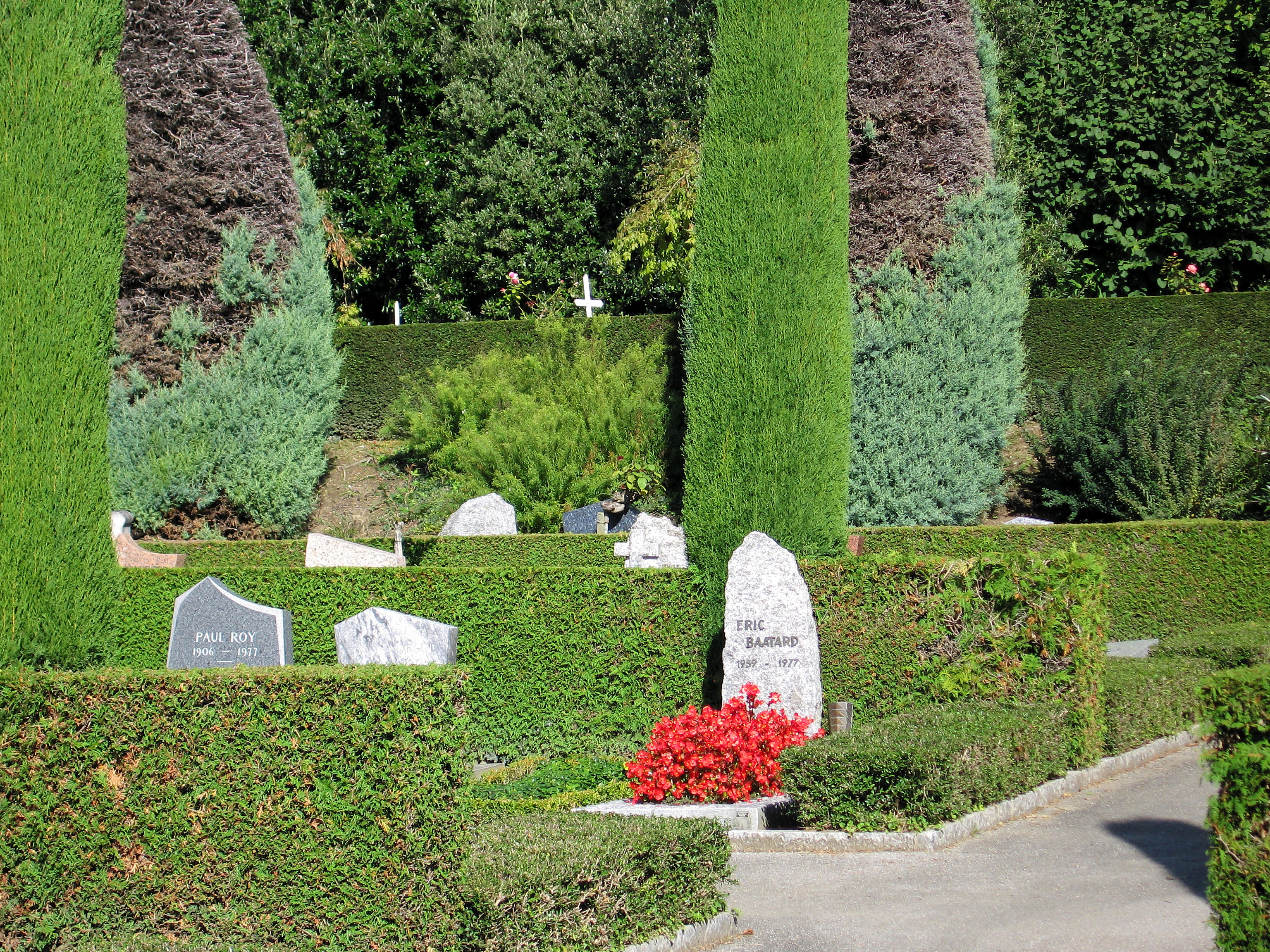 Cimetière du Bois-de-Vaux